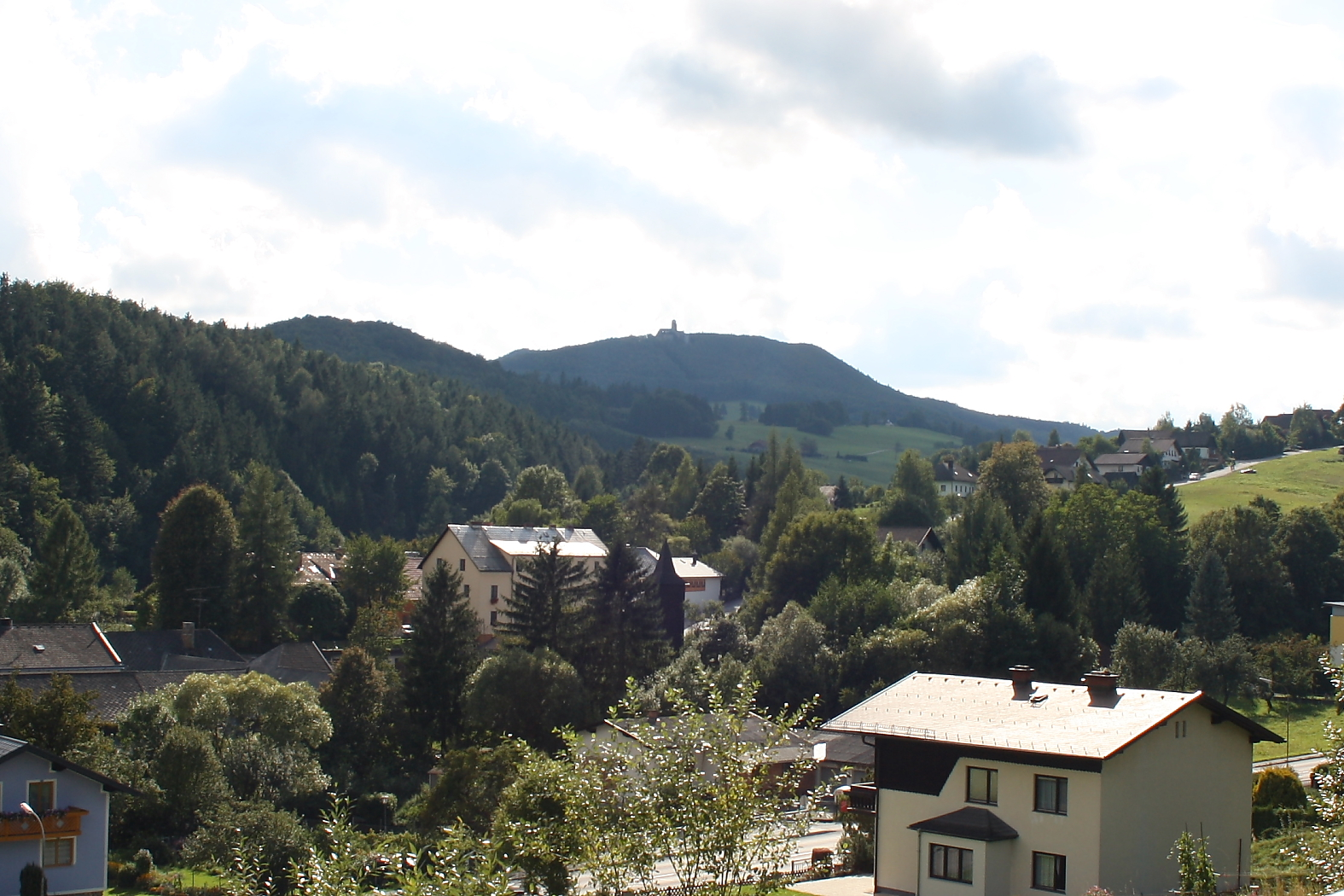 Der Araberg mit der Araburg (im Hintergrund, Bildmitte) von Kaumberg aus gesehen.